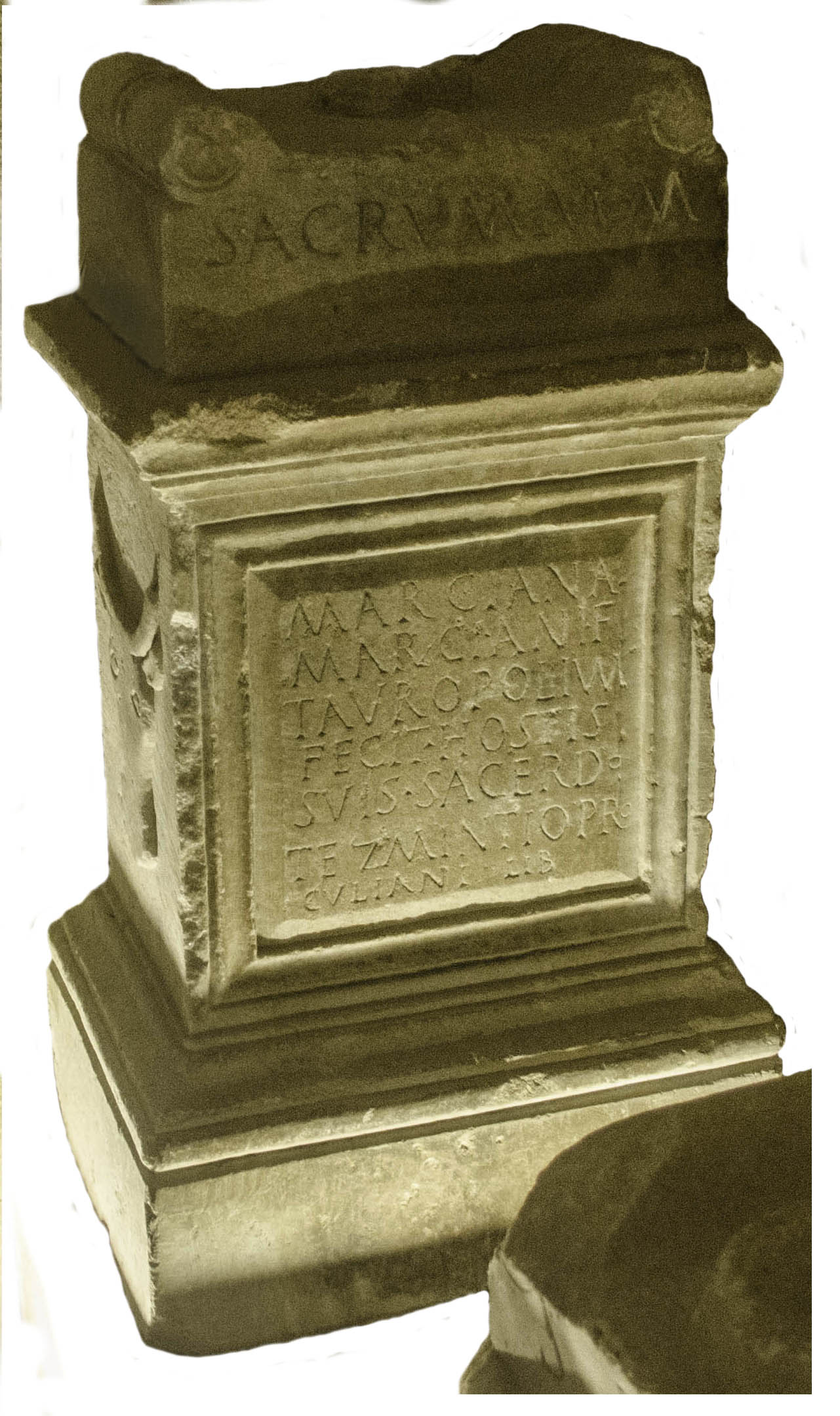 Autel tauroblique de Marciana, v. 176 ap. JC, marbre, CIL XIII, 509. Musée Eugène-Camoreyt de Lectoure, Gers, France.